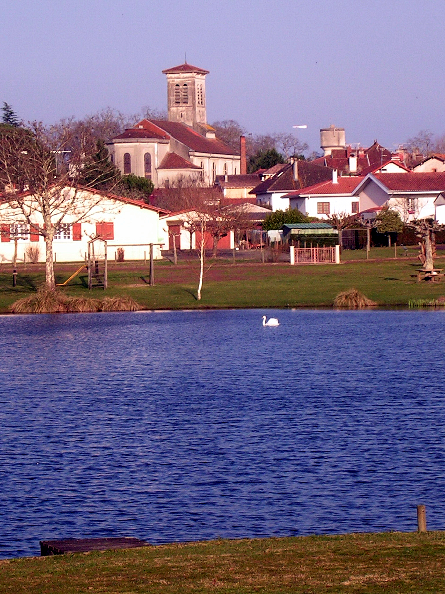 Le lac et l'église de Brocas, dans le département français des Landes